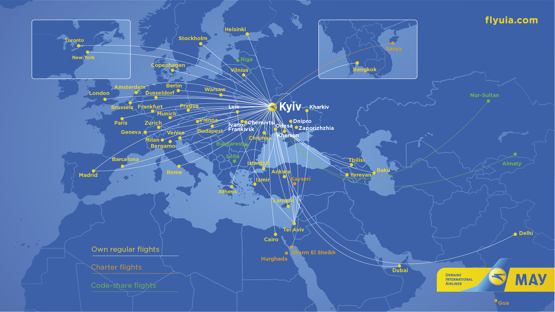 new routemap valid from 02/2020